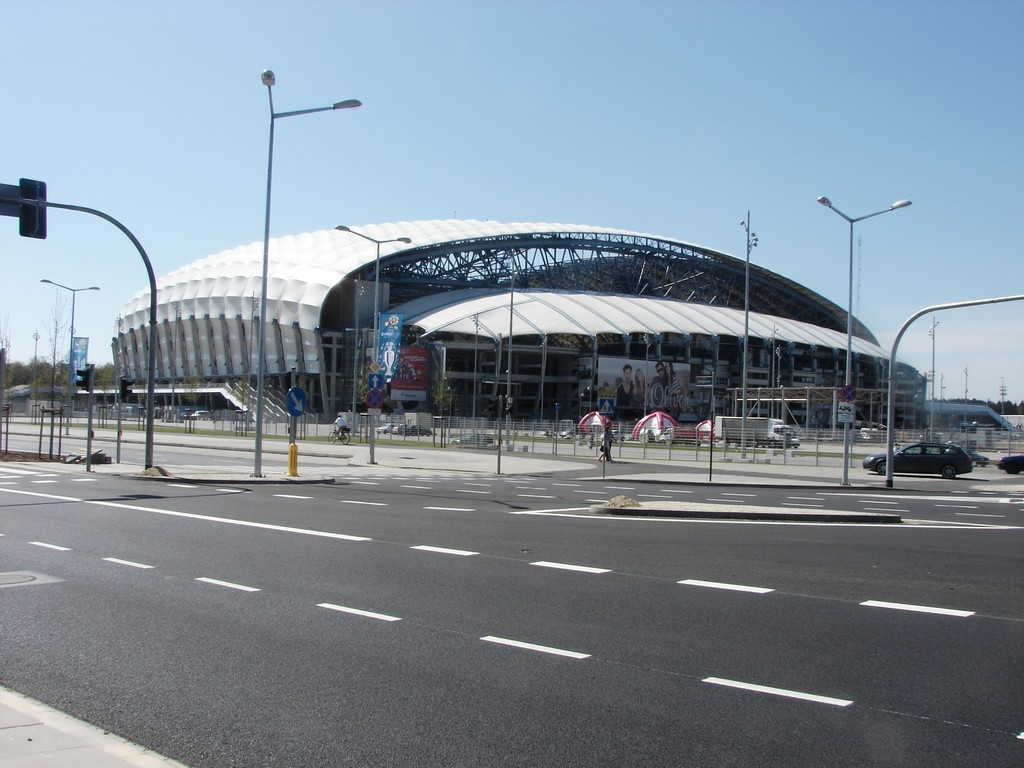 Stadion Miejski w Poznaniu